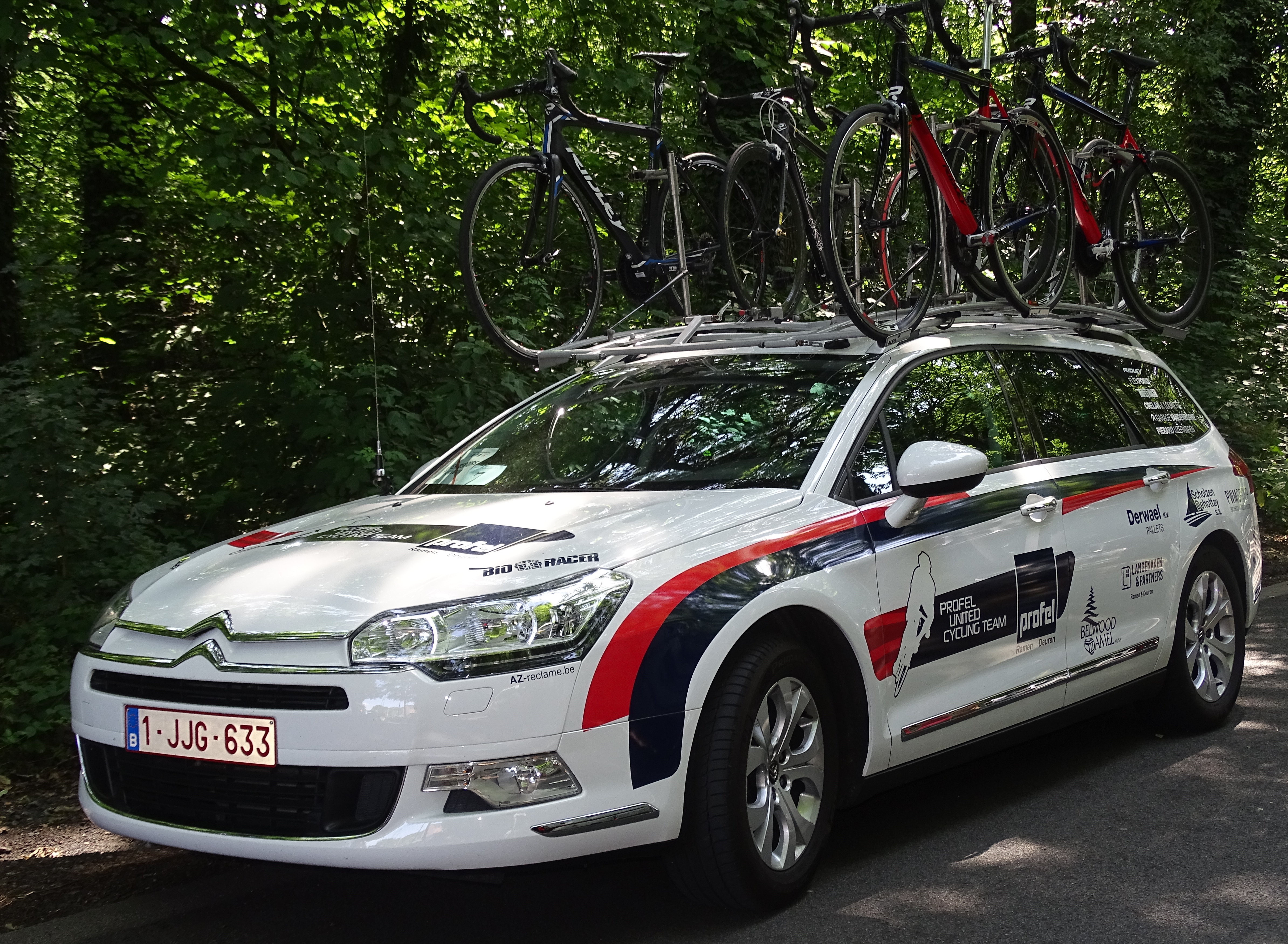 Reportage réalisé le vendredi 17 juillet à l'occasion du départ et de l'arrivée du Tour de la province de Liège 2015 à Ougrée (Seraing), Belgique.